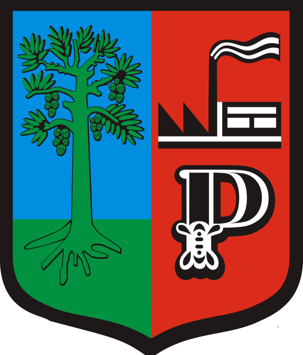 Herb Gminy Pieńsk